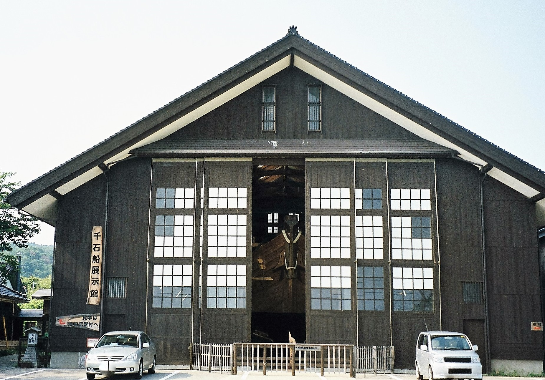 佐渡市の千石船展示館